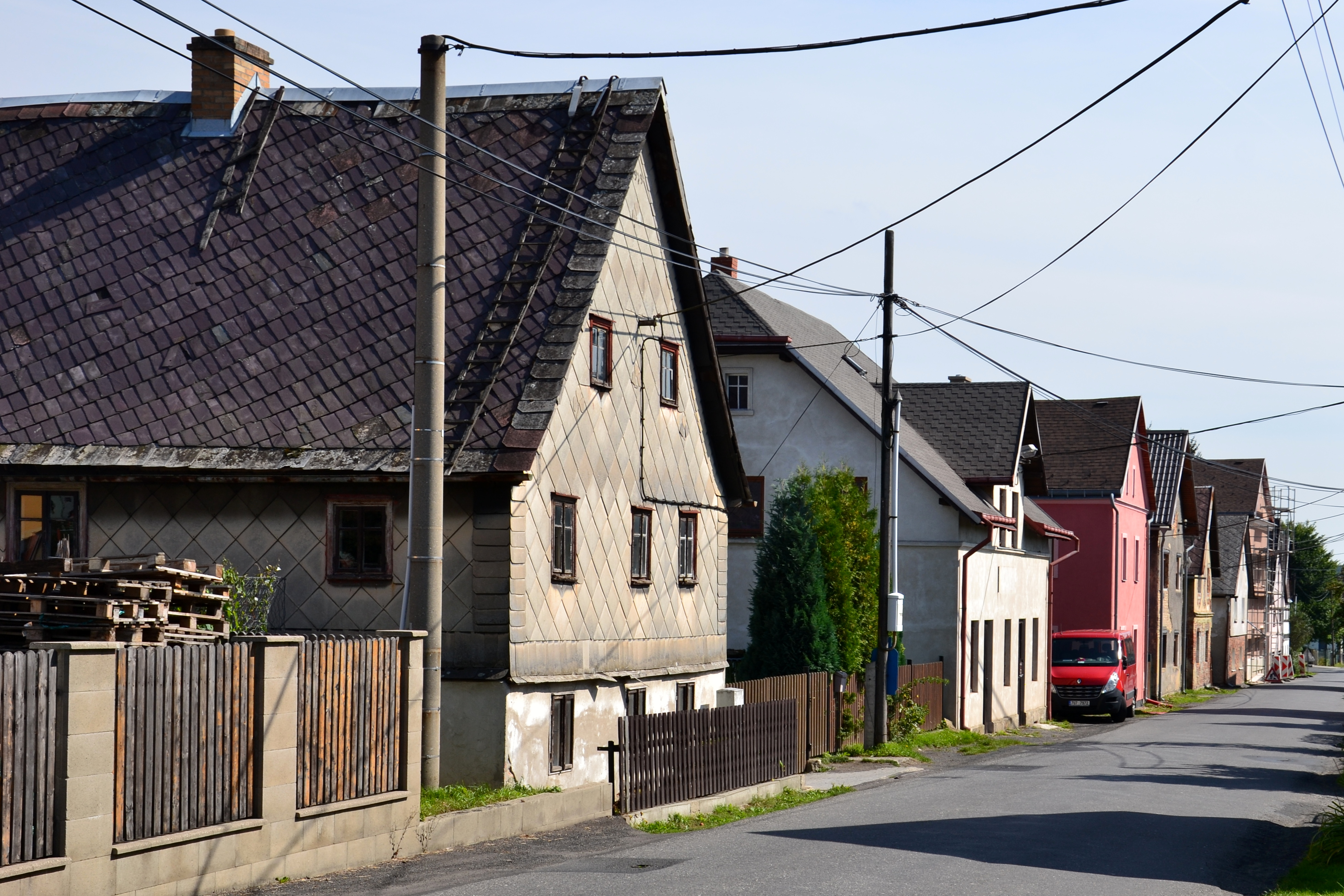 Domy ve středu vesnice